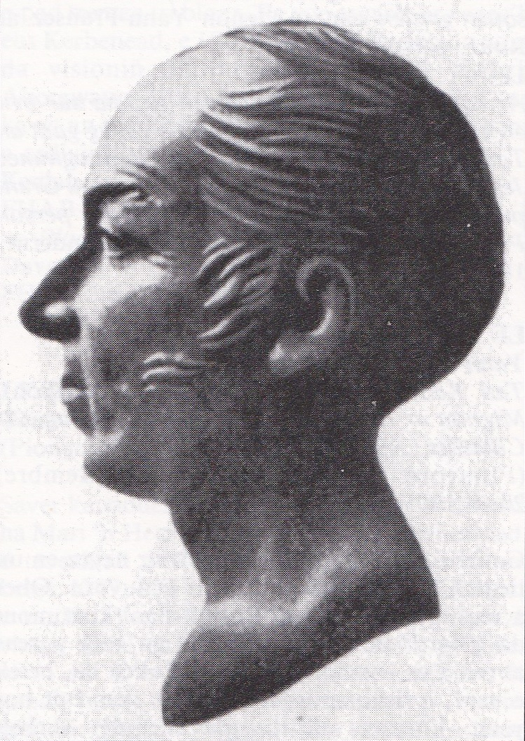 Le lexicologue et grammarien breton Jean François Le Gonidec